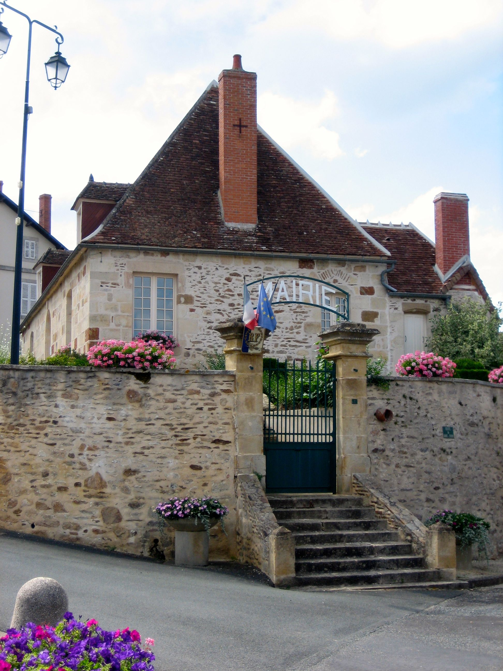 Mairie de Saint-Saturnin un jour de fête